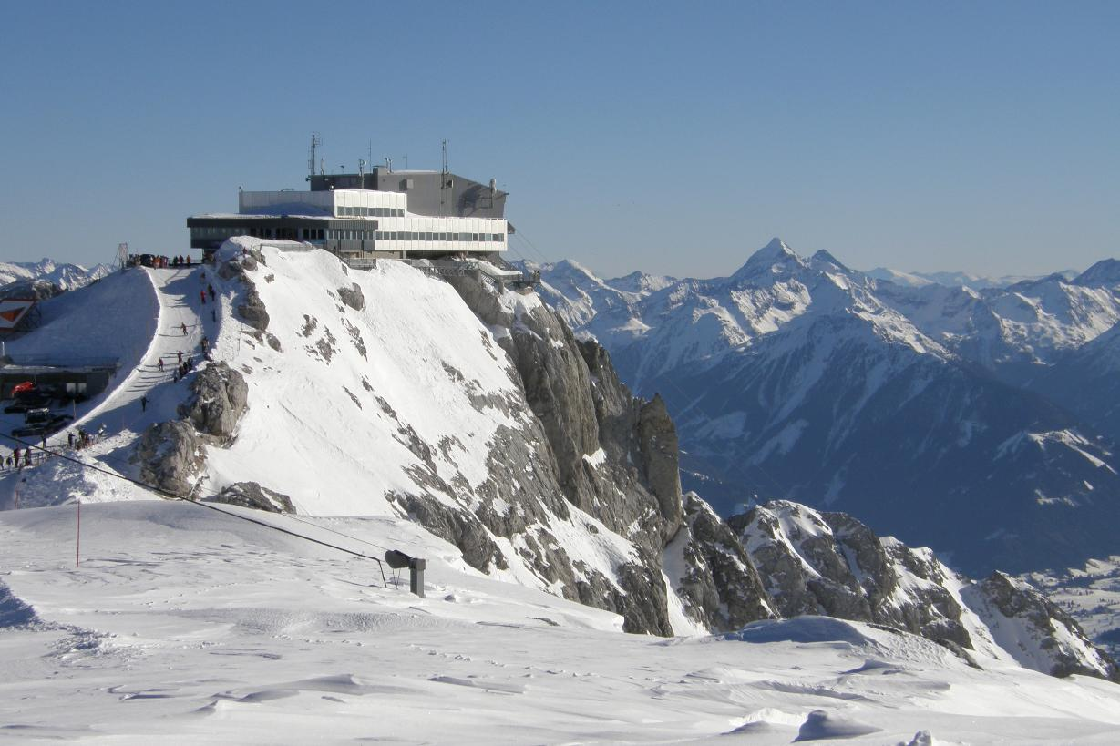 Dachstein, Bergstation, stacja górna